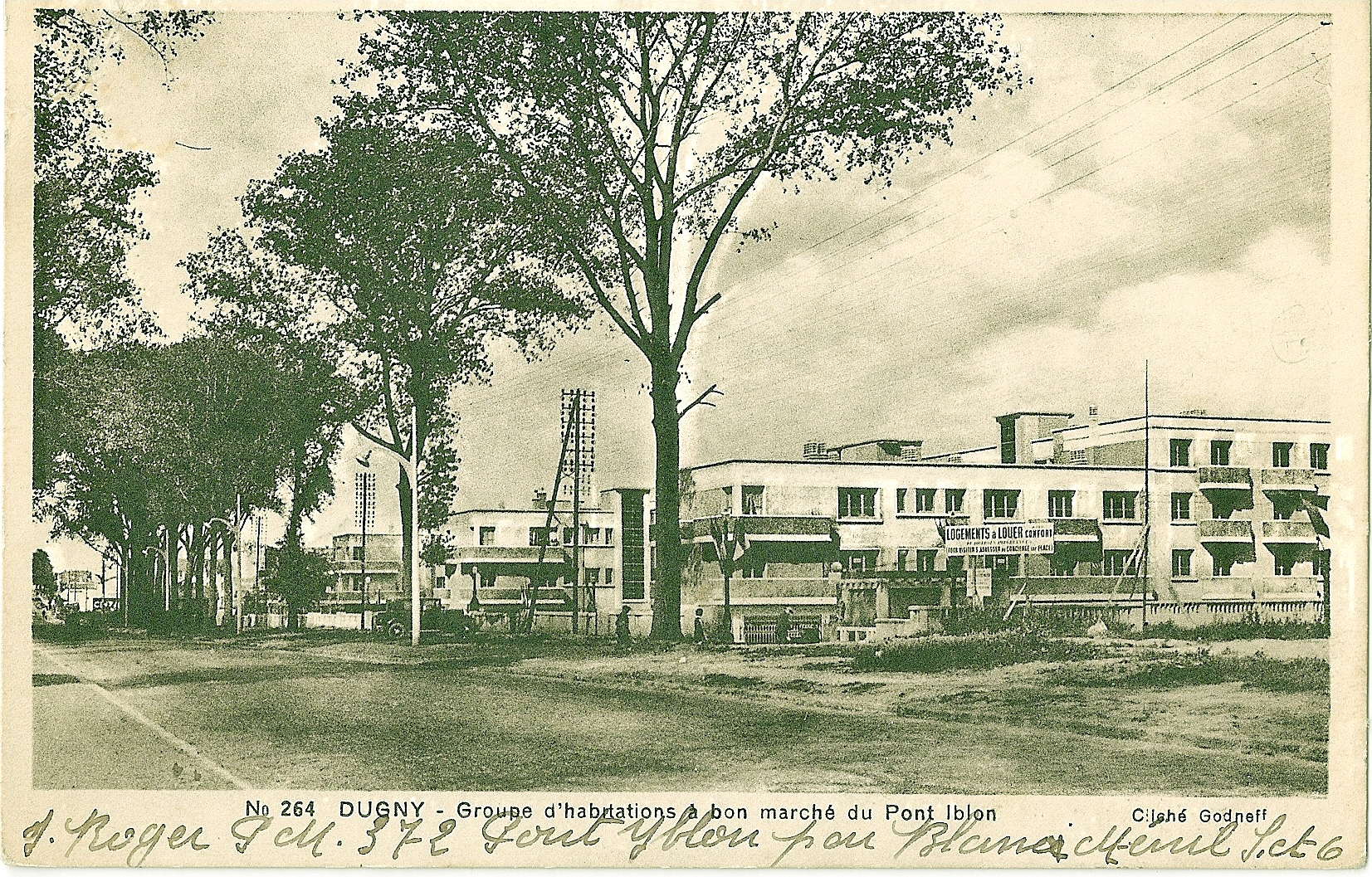 Carte postale ancienne éditée par Godneff, N°264 DUGNY : Groupe d'habitations à bon marché du Pont Iblon (aujourd'hui Pont-Yblon) Ensemble HBM conçu par Germain Dorel pour le Foyer du Progrès et de l'Avenir de 334 logements - 1933